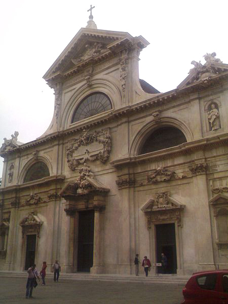 Duomo di Savona